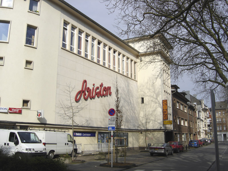 Kino Ariston. Allgemenges zum Bild: Dëst Bild weist de Kino Ariston zu Esch-Uelzecht